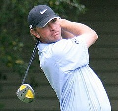 Lucas Glover